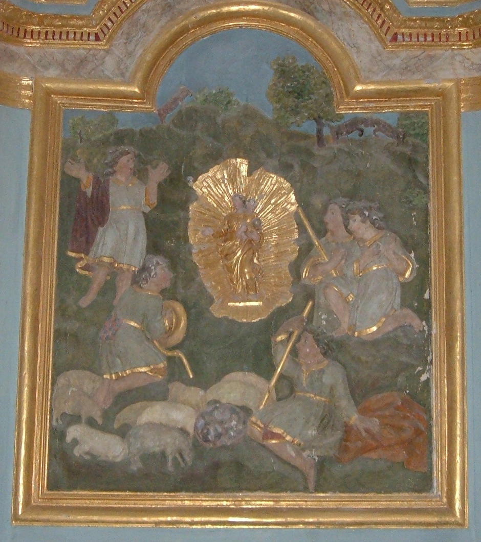 Opera in stucco con la raffigurazione di un miracolo attribuito alla Vergine di Bétharram. Santuario Notre-Dame di Bétharram, Francia.